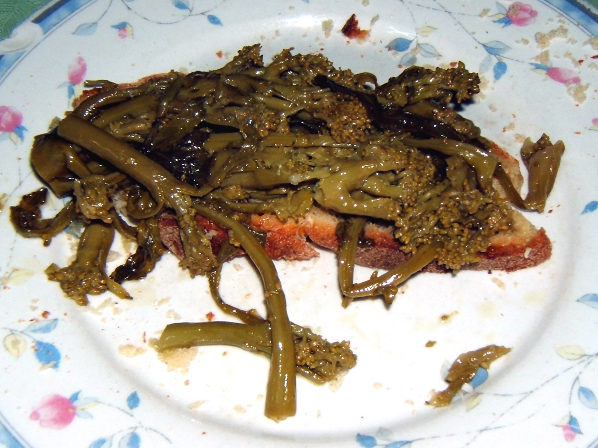 Cime te rape 'nfucate (rape affogate), piatto salentino foto by me